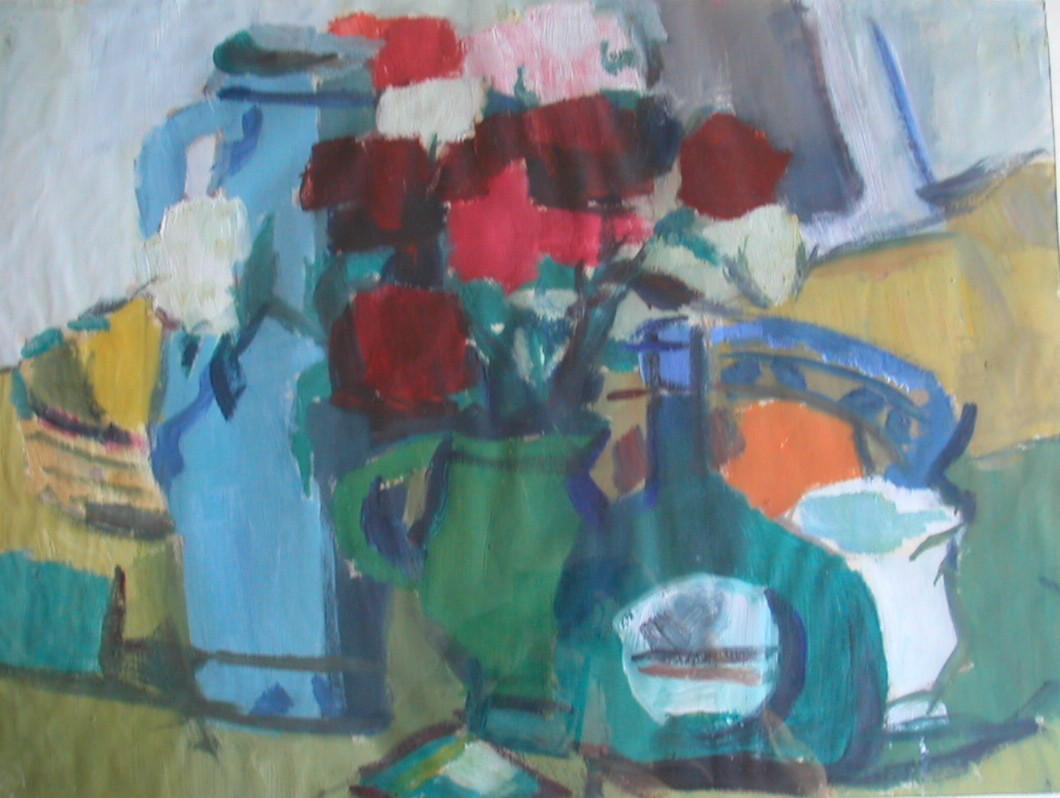 Gemälde von Sigmund Strecker: Stillleben mit Bocksbeutel